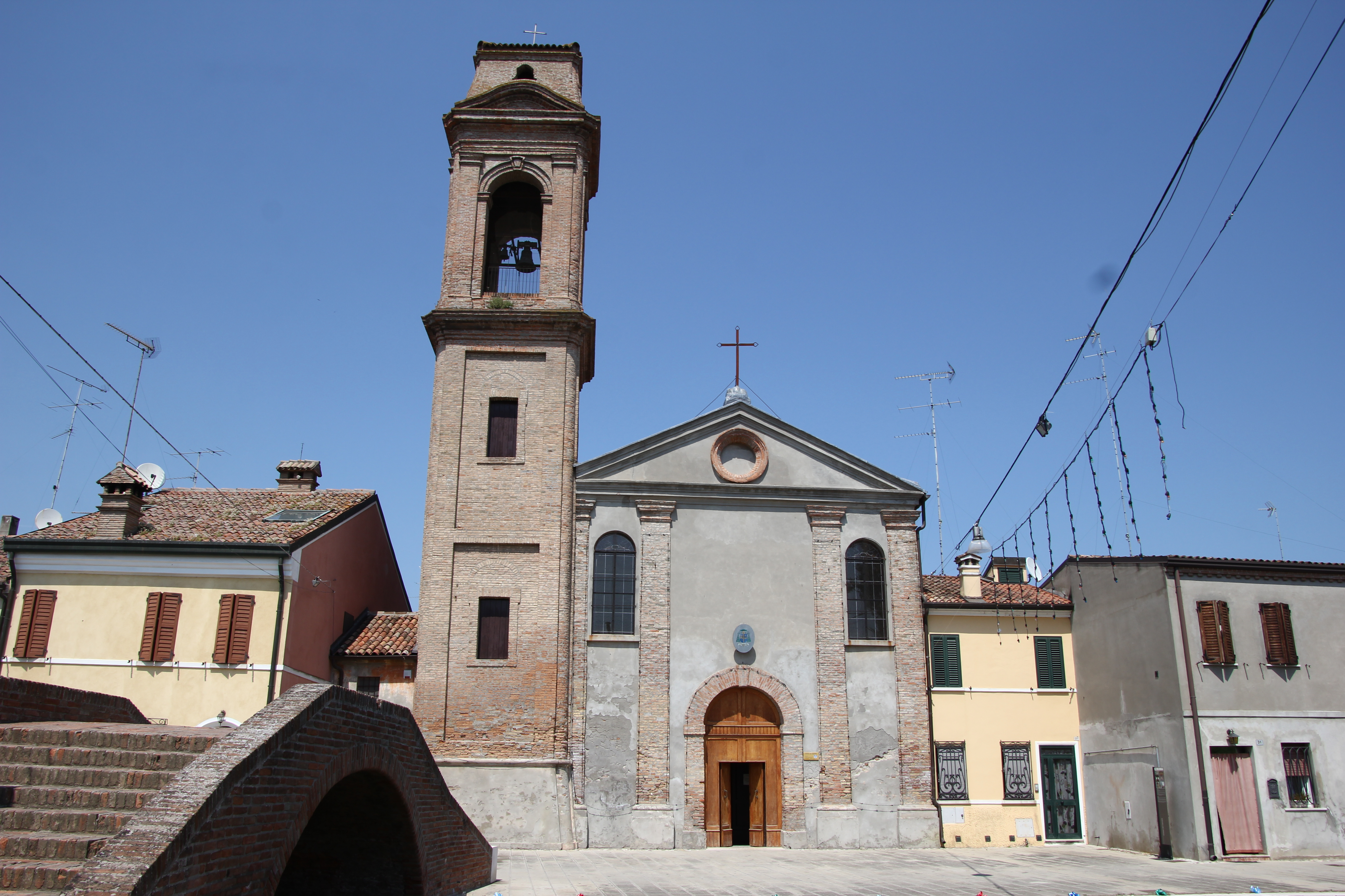 Comacchio, chiesa del Carmine